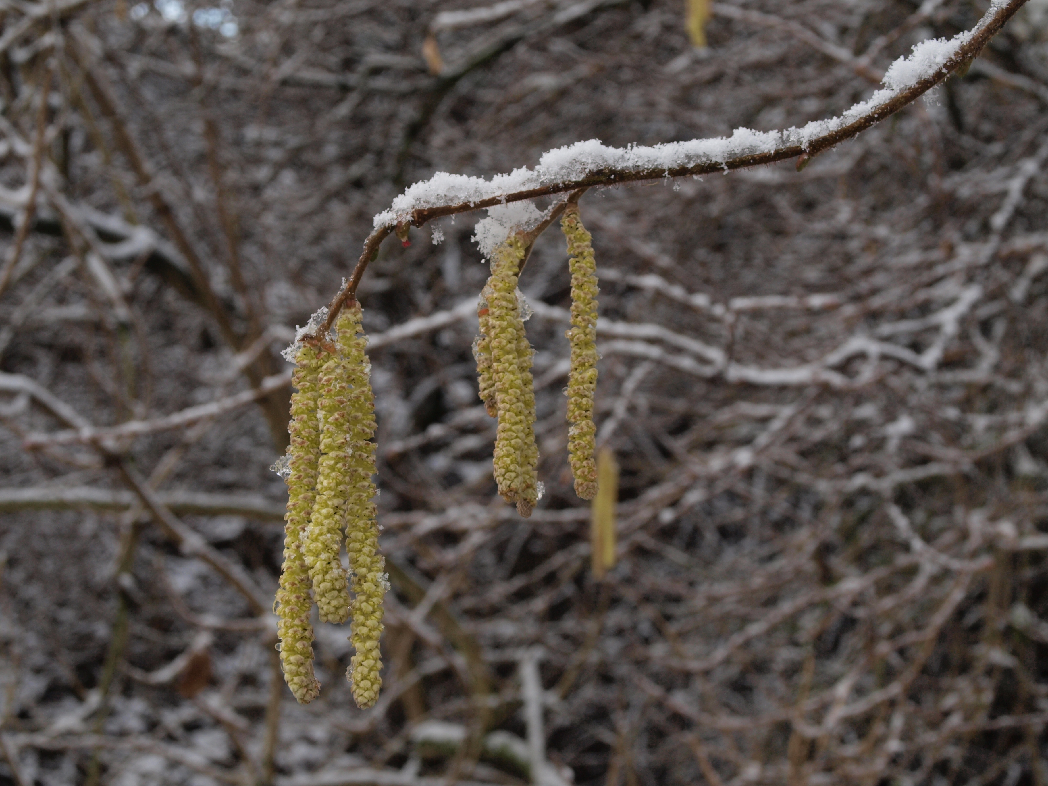 květy lísky pod sněhem; fotografie vznikla pro vzdělávací potřeby ČHMÚ